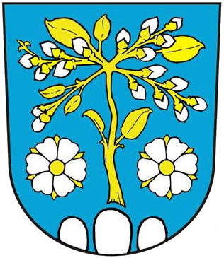 znak, ,Jívoví okres Žďár nad Sázavou